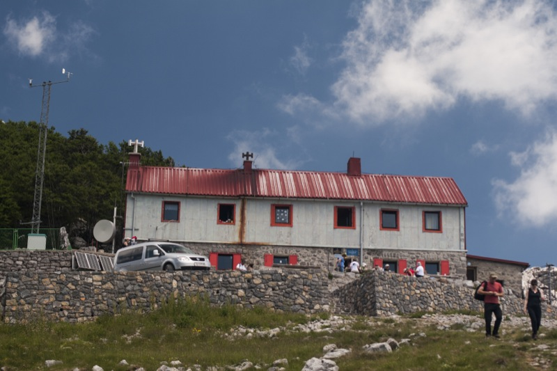 Planinarski dom Zavižan